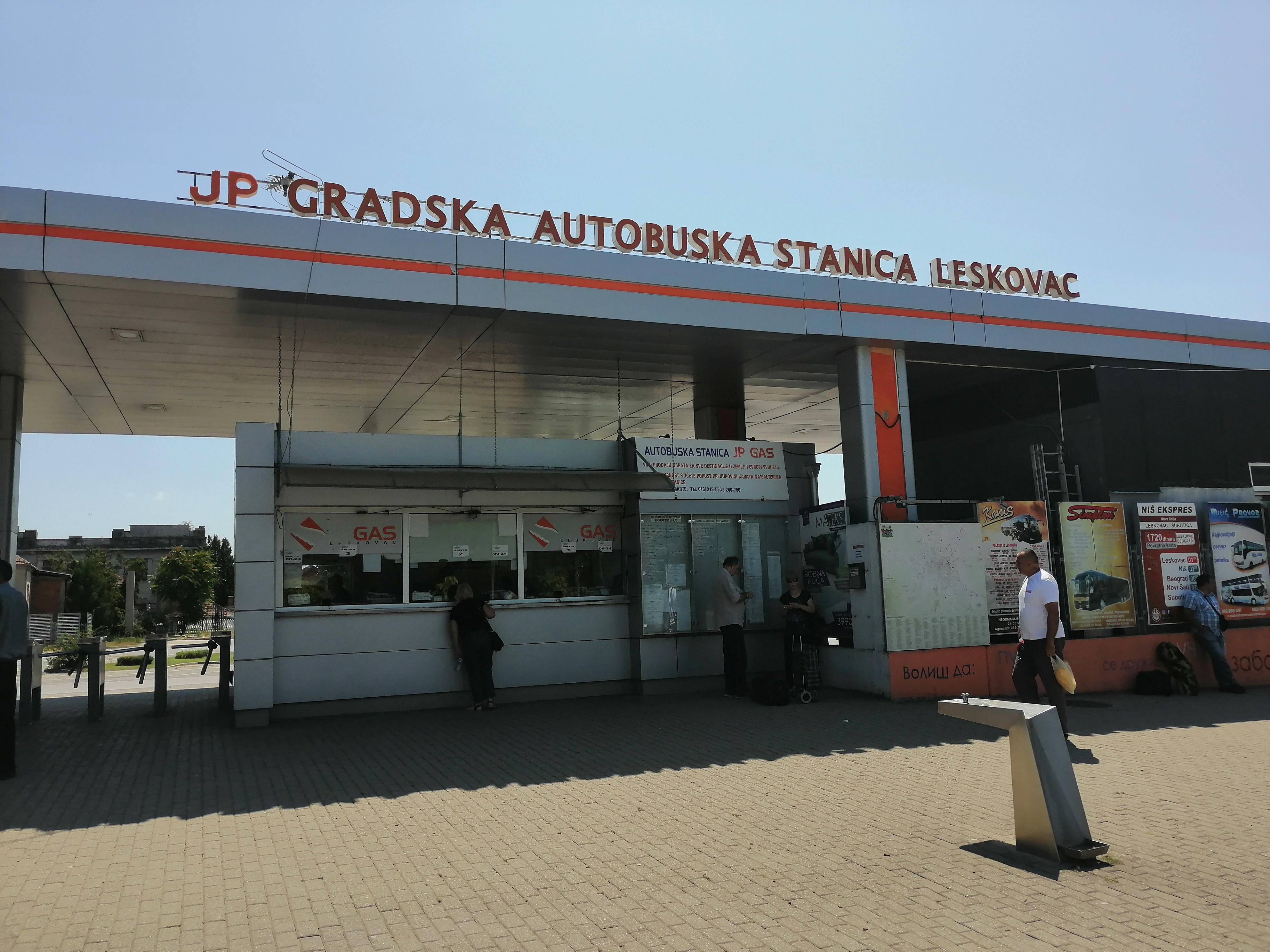 Srpski (latinica): Autobuska stanica Leskovac